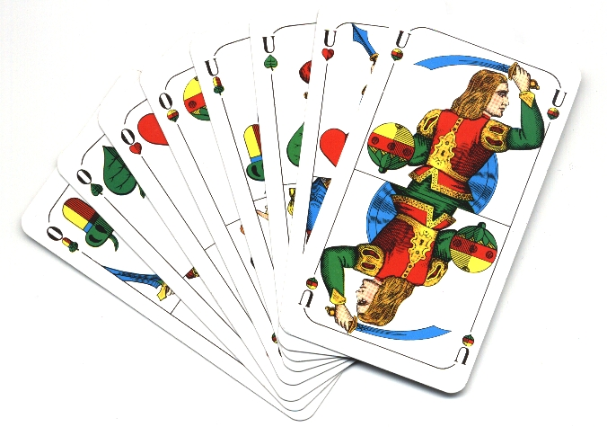 Schafkopf, Bayerisches Bild